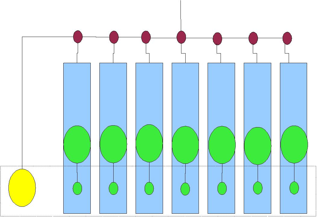 schéma d'une structure de projet fonctionnelle Benoit Minaudier